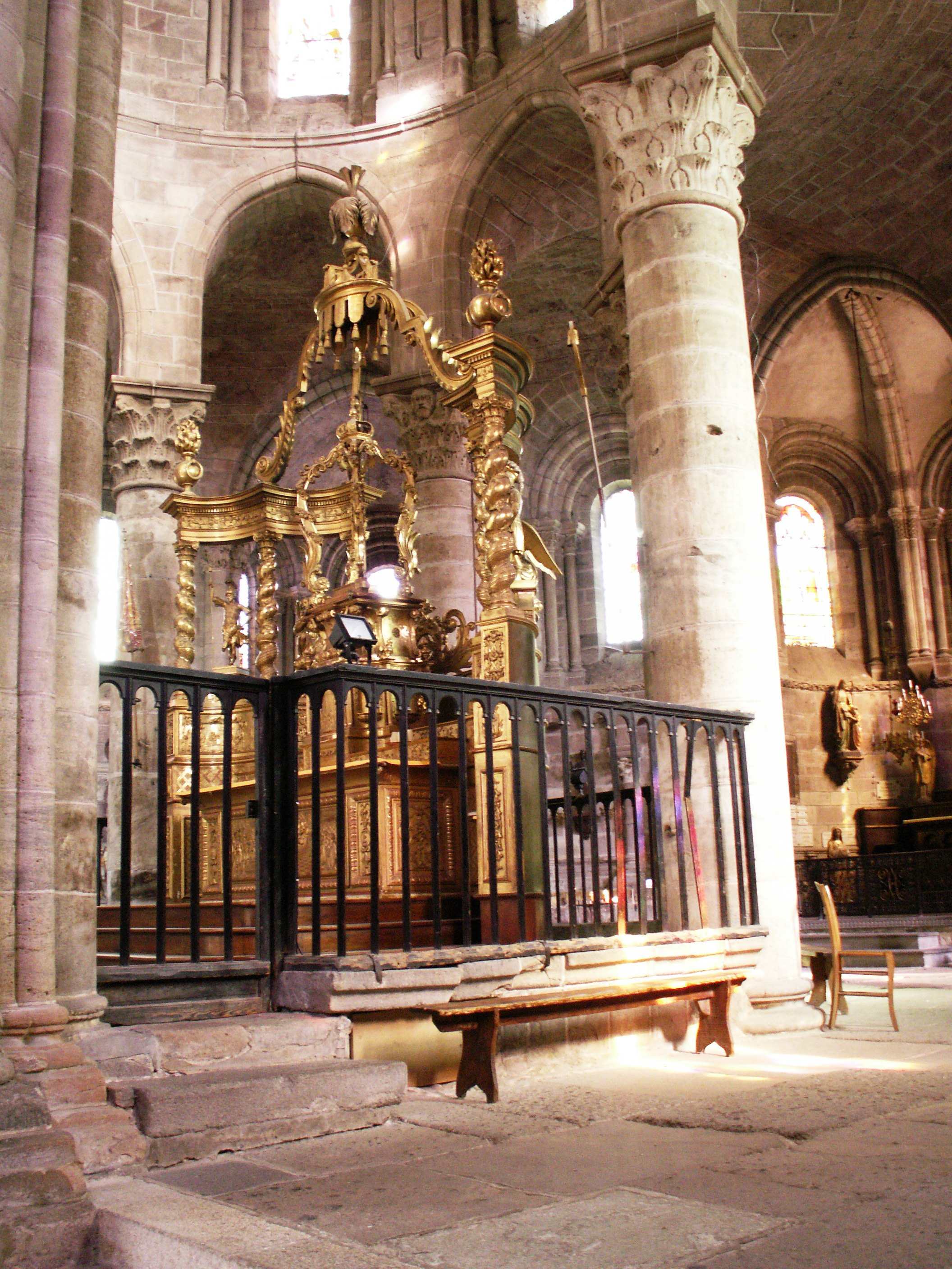 Barrière de choeur et autel majeur de Brioude